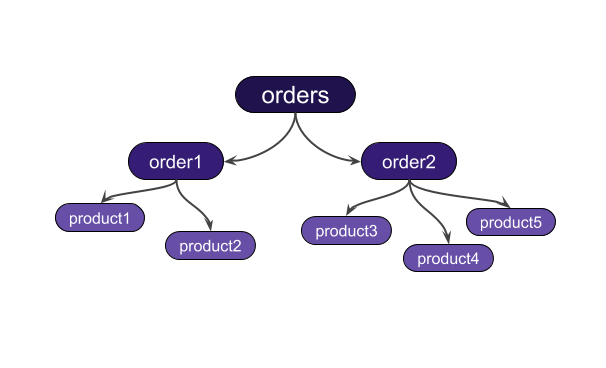 Représentation arborescente d'un exemple de réponse à une requête GraphQL.